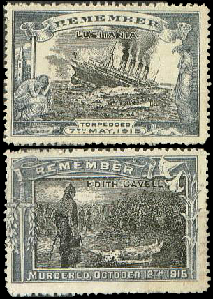 Британские пропагандистские марки серии "Помните", посвящённая потоплению "Лузитании" и казни Эдит Кейвелл, 1915 год.